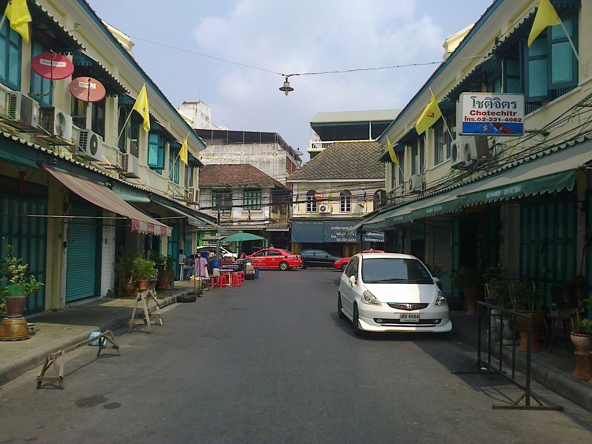 PHRAENG PHUTHON